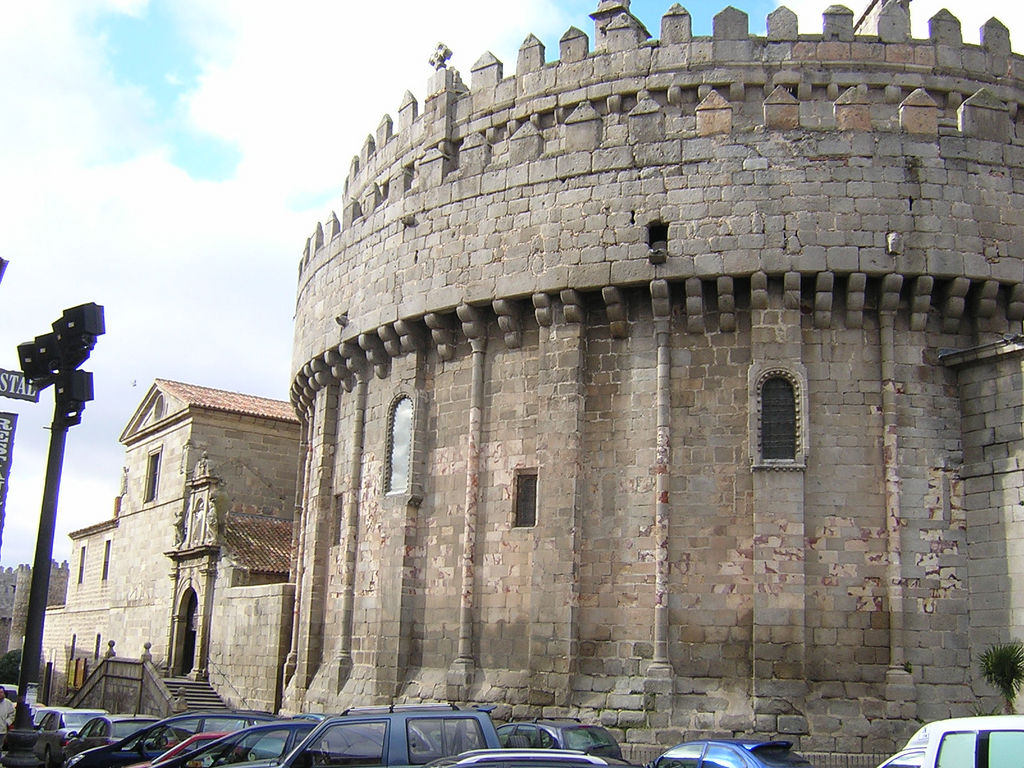 Cimorro de la Catedral de ÁvilaÁvila